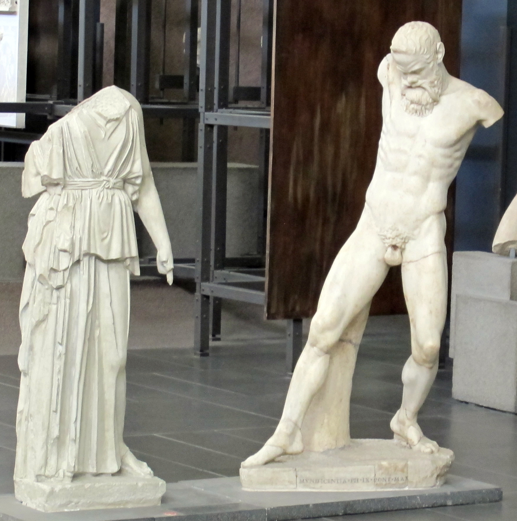 Mirone (da), Atena e Marsia, copia romana da originale del 450 .